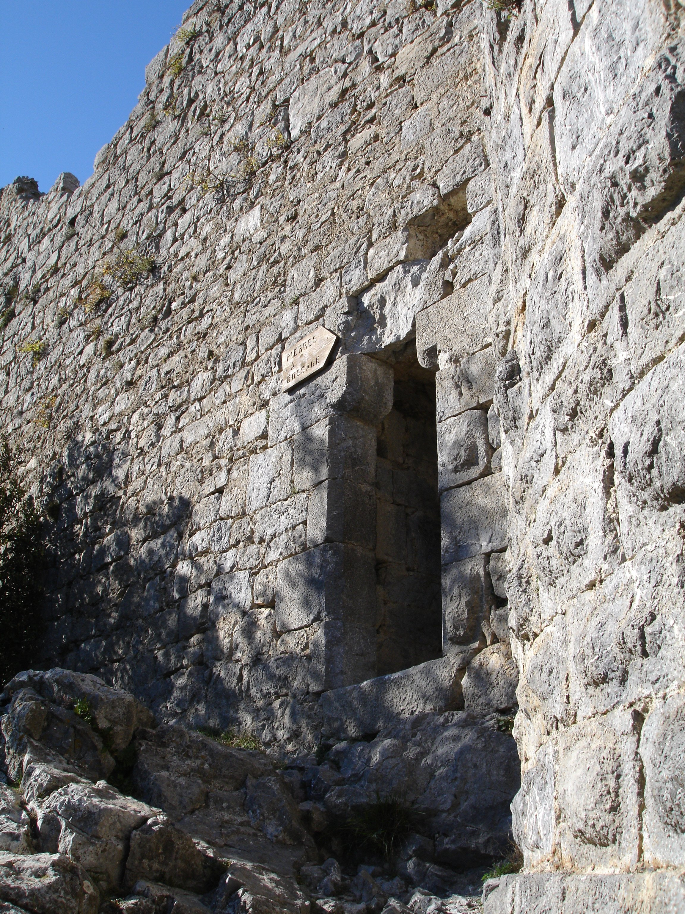 Château de Puilaurens